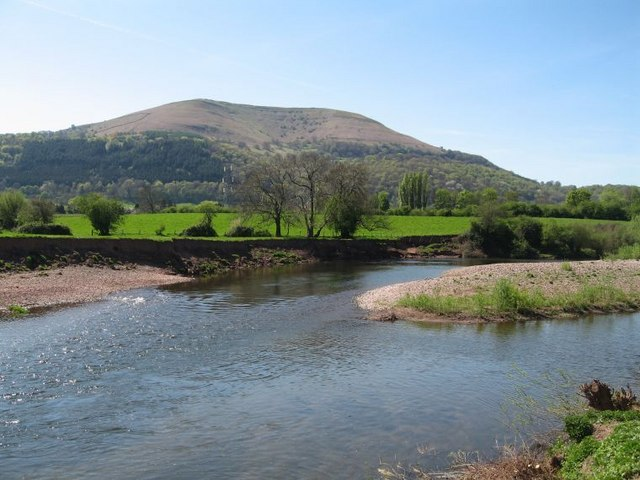 River Usk at Abergavenny